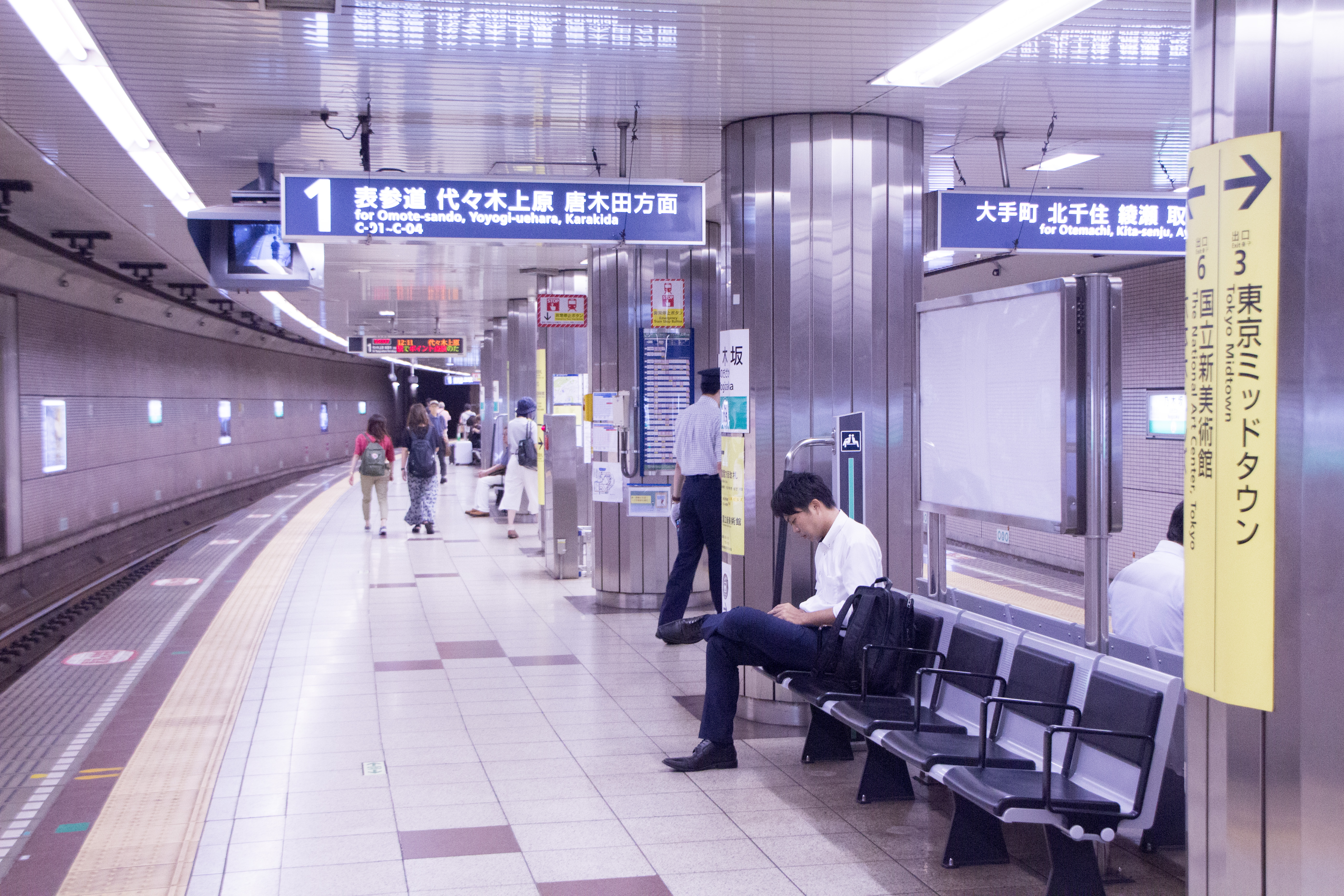 此为东京地铁千代田线乃木坂站的站台。